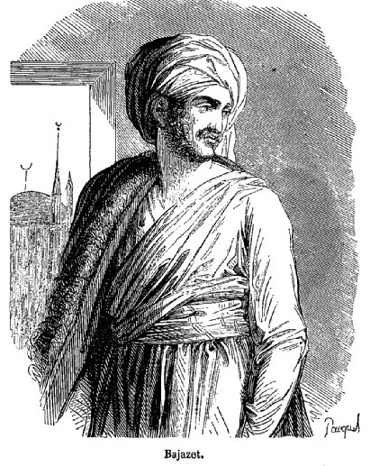 Illustration par Pauquet de la tragédie Bajazet de Racine, dans le Panthéon populaire illustré, 2e série, 1851